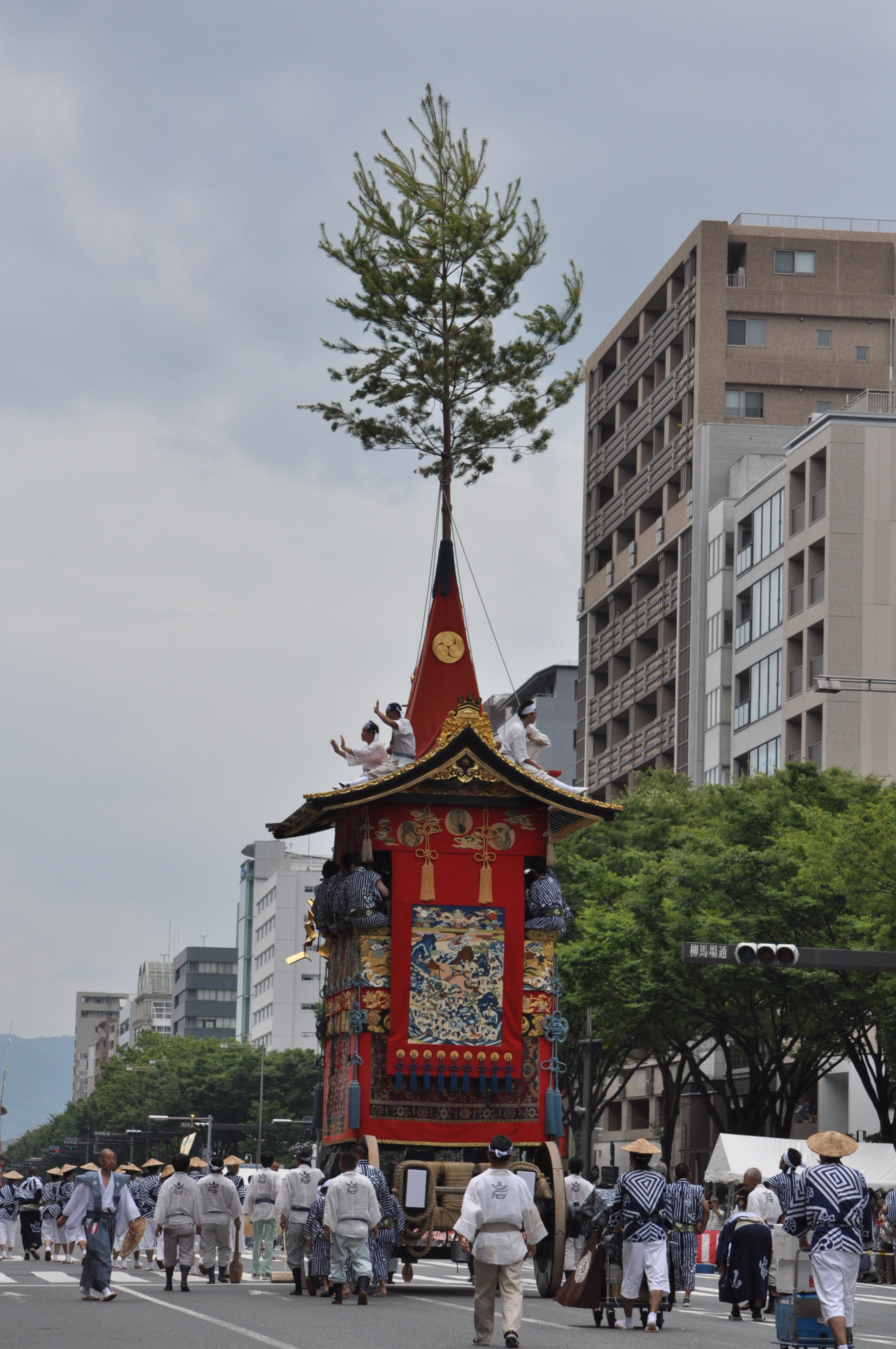 祇園祭 岩戸鉾